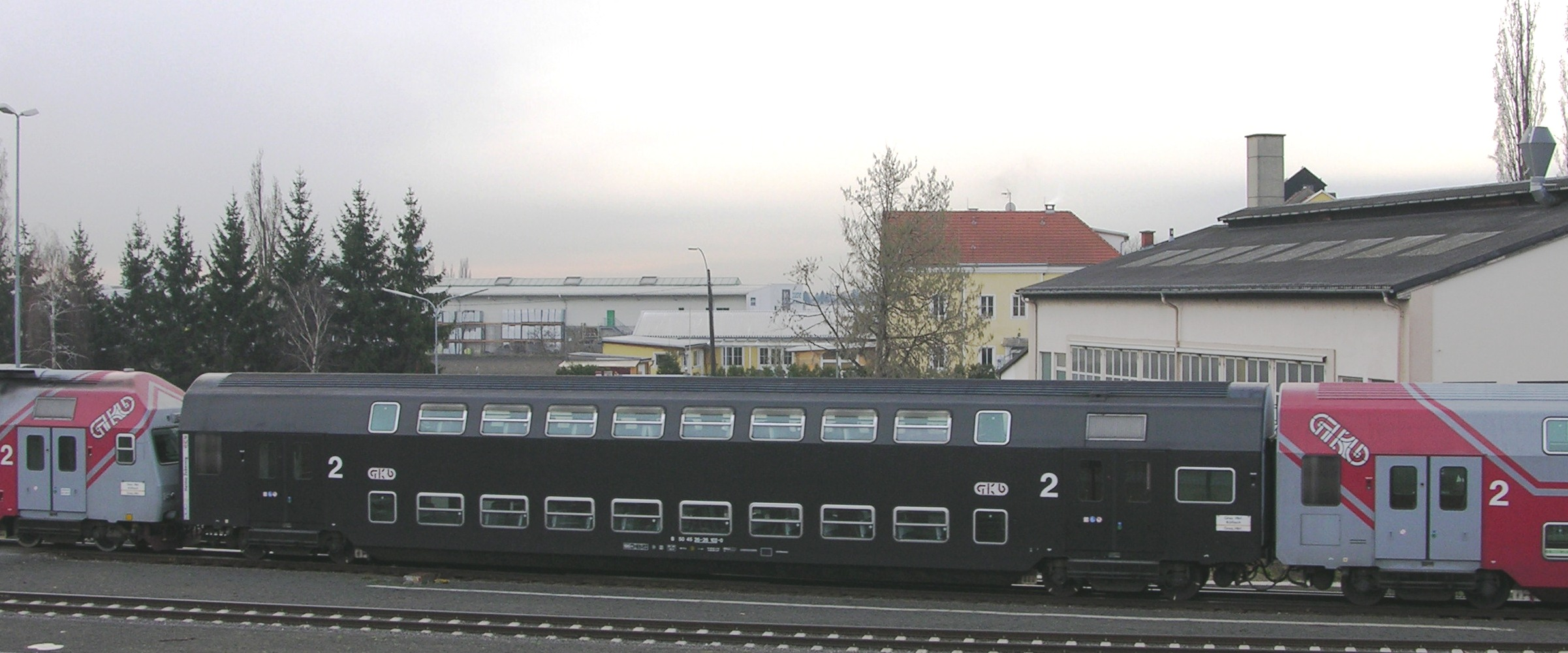 GKB Doppelstockwagon gestaltet von Heimo Zobernig